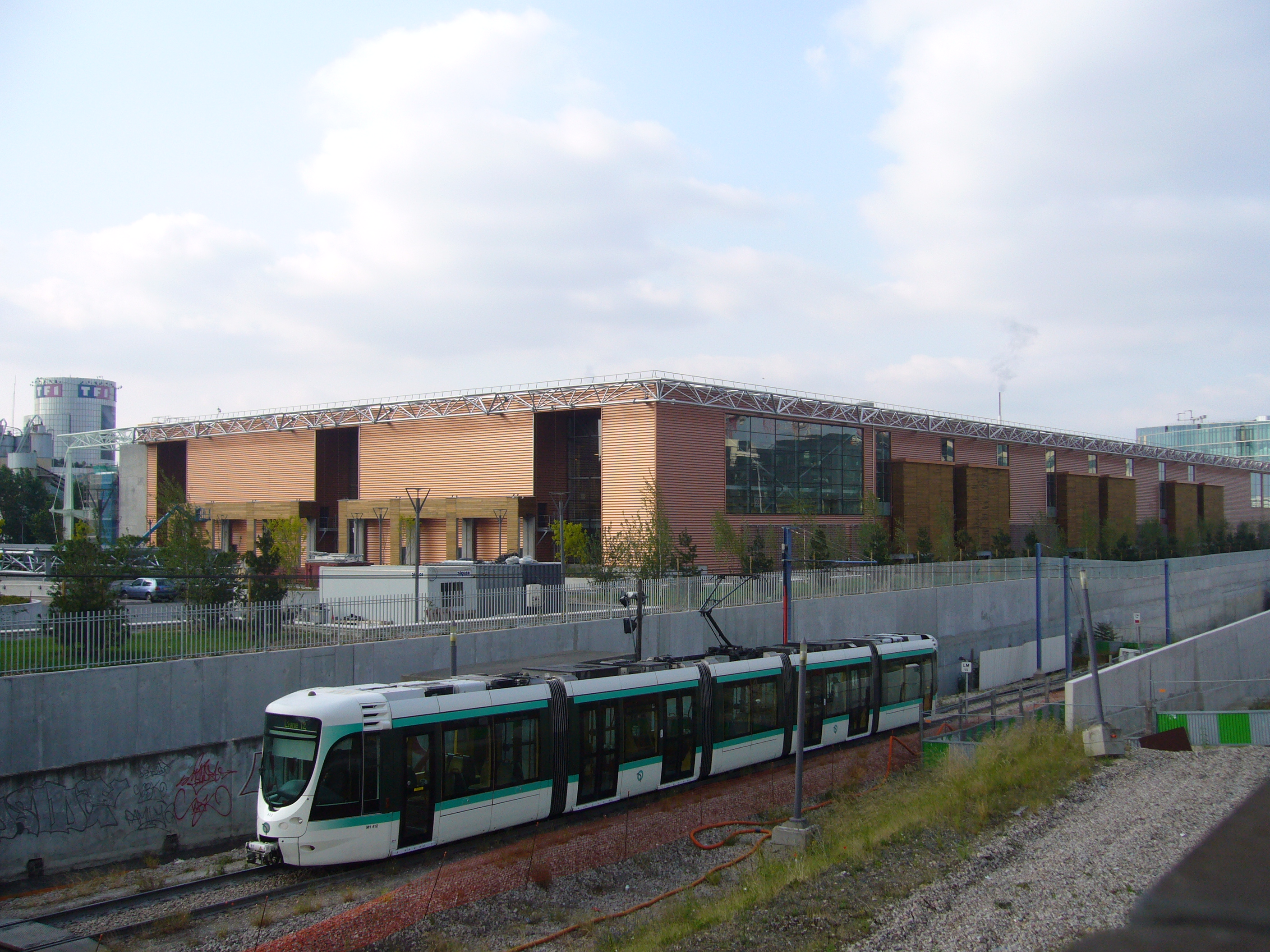 Usine de traitement des déchets ménager Isséane derrière la voie de retournement du terminus de la ligne de tramway T2.